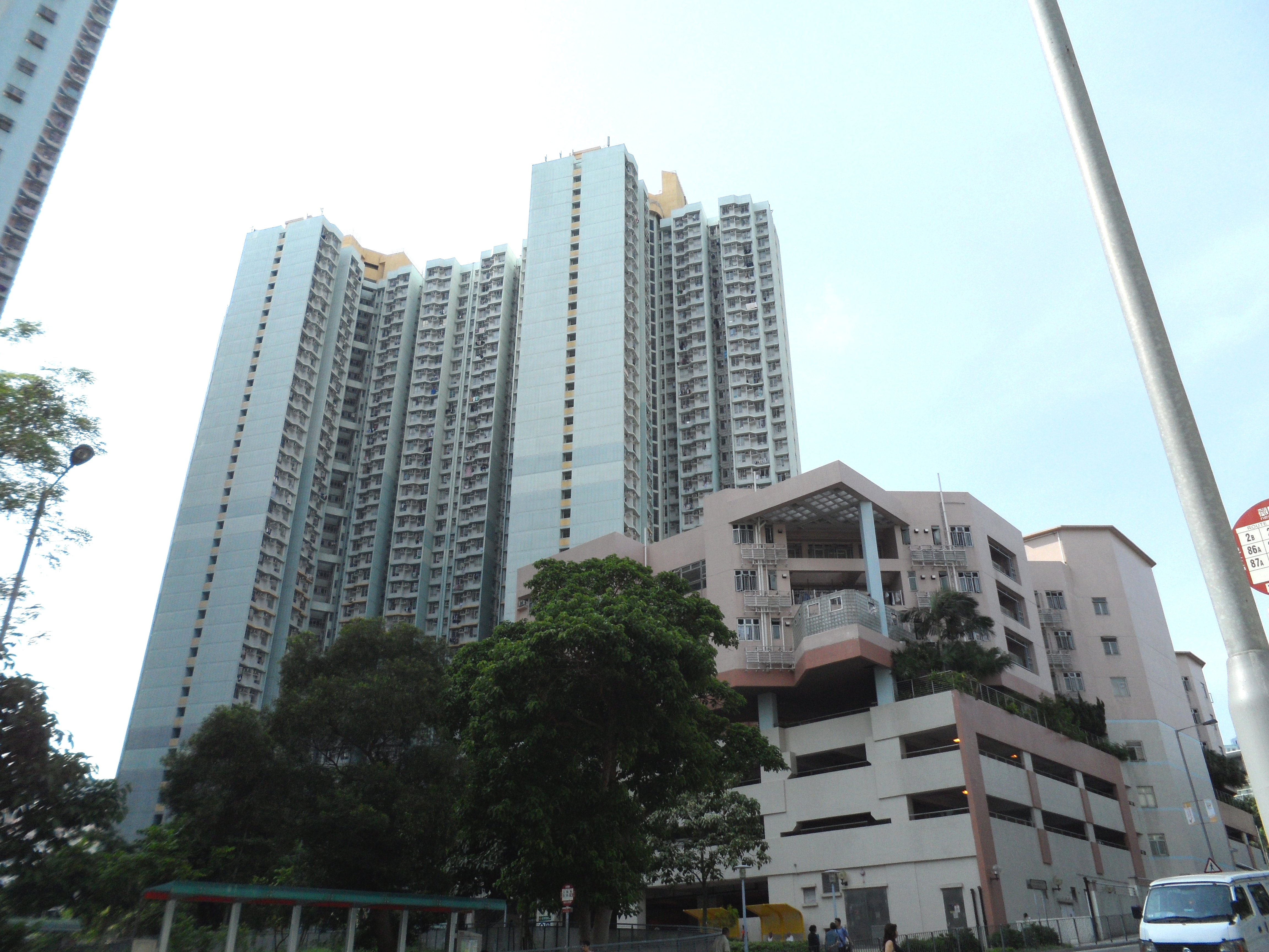 白田邨盛田樓與昌田樓